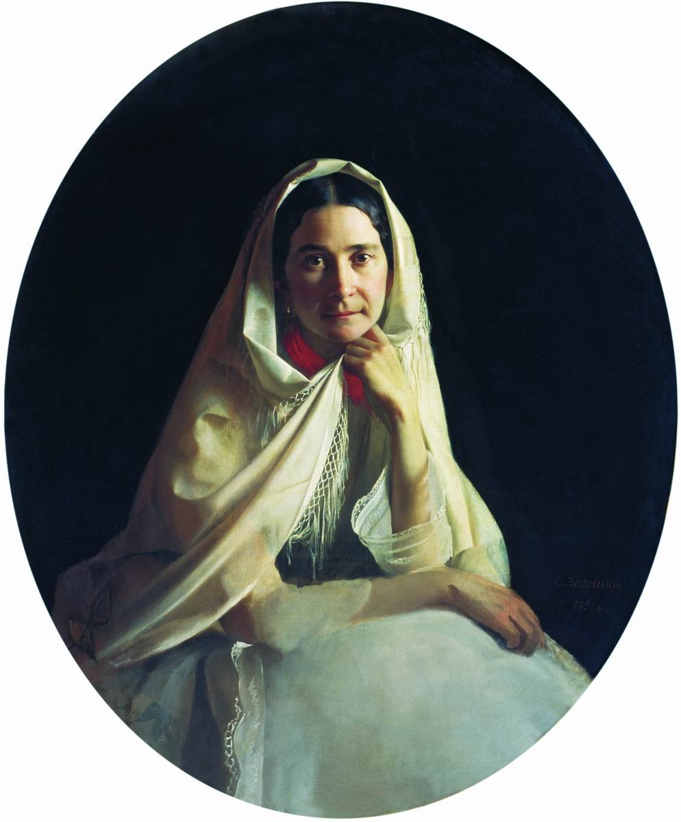 Портрет М.И.Аврориной. 1845 // Портрет неизвестной(второй жены Ф.П. Толстого, А.И.Толстой, урожденной Ивановой) 1851